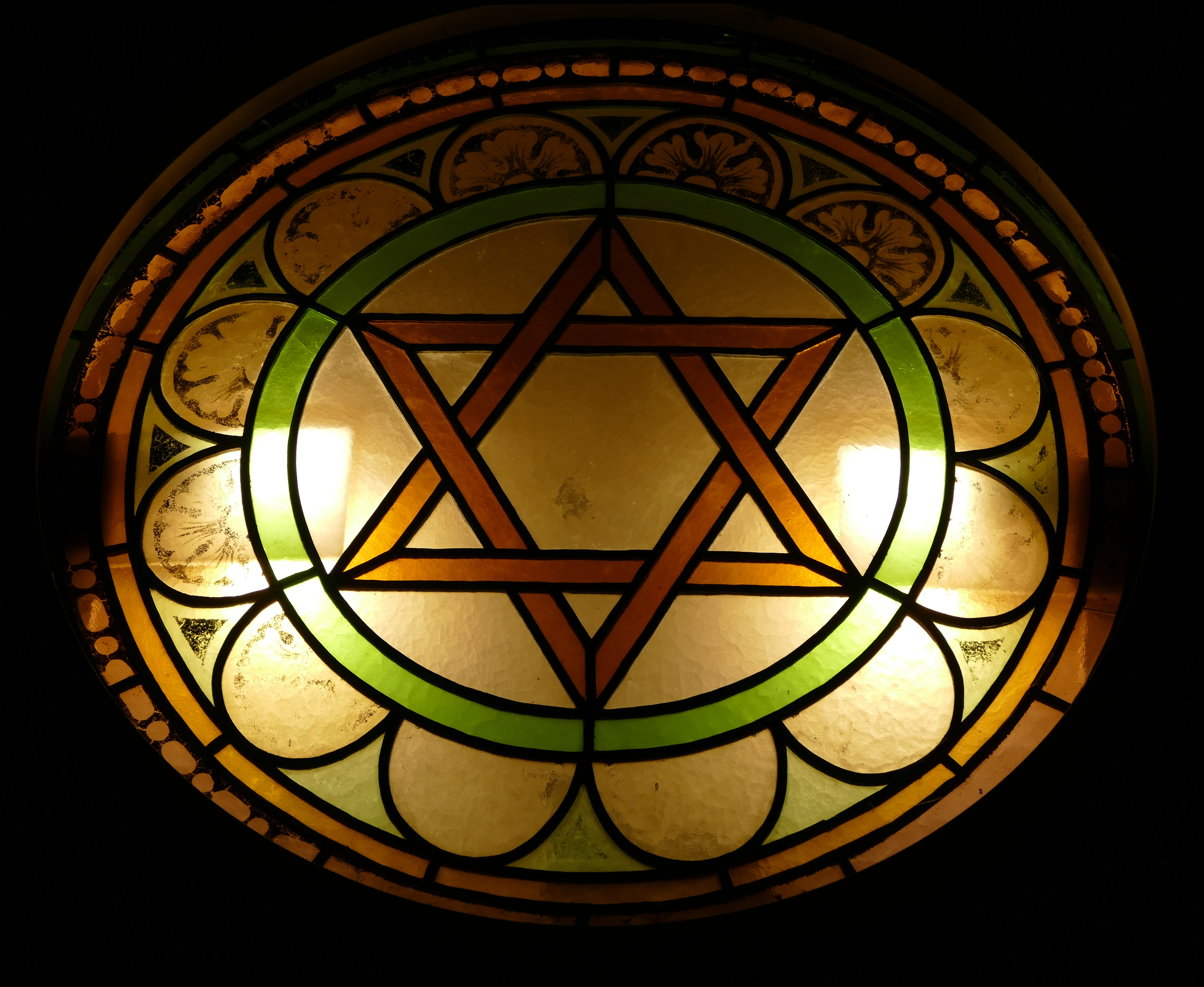 Alsace, Bas-Rhin, Bouxwiller, Synagogue (XIXe), 62a Grand'Rue (PA00084657, IA67009580).Musée judéo-alsacien.